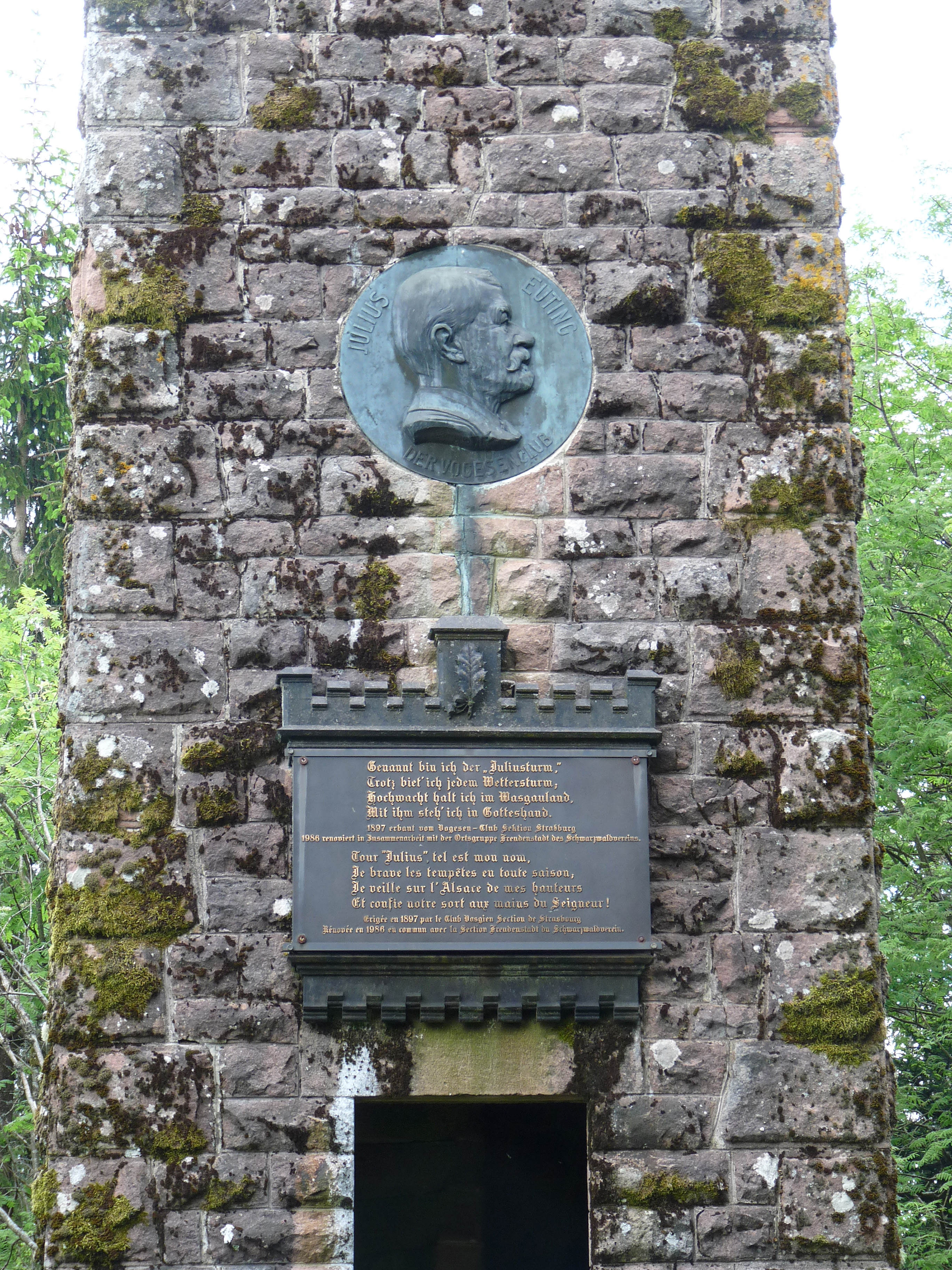 Médaillon de Julius Euting et plaque commémorative sur la tour Julius au sommet du Climont (Bas-Rhin).